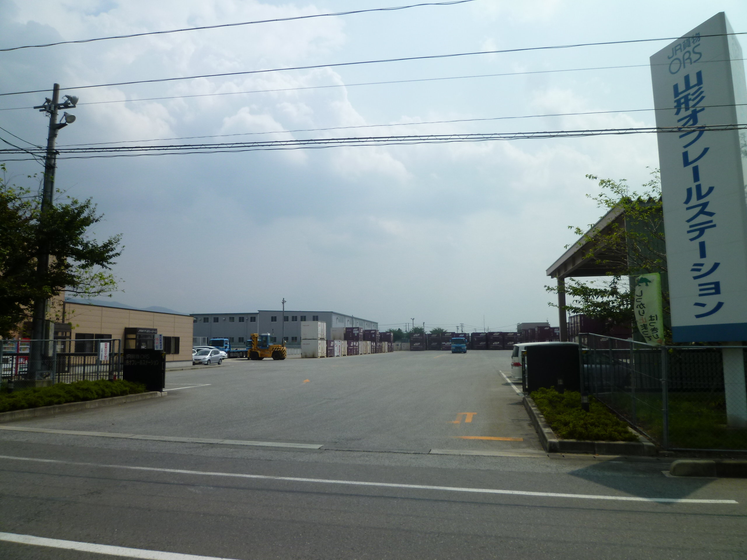 JR貨物山形オフレールステーション。山形県山形市漆山に所在。